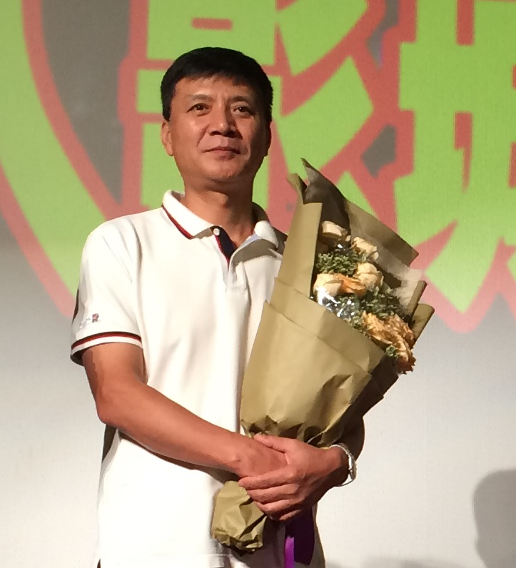 演员刘之冰出席电影百团大战剧组见面会，在南京金陵工人影城，截取自File:Movie hundred group battle,in Nanjing,20150831,03.jpg